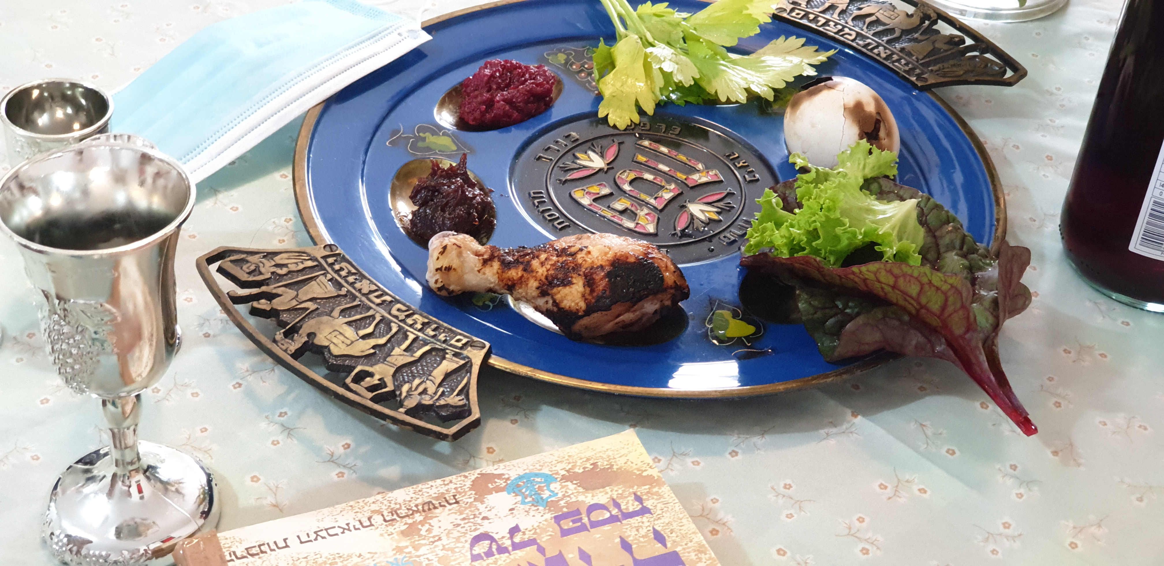 קערת ליל הסדר